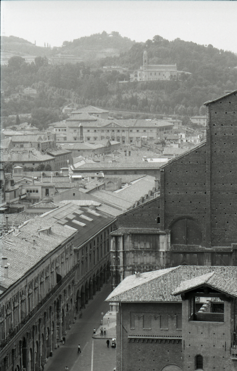 Servizio fotografico : Bologna, 1969 / Paolo Monti. - Strisce: 7, Fotogrammi complessivi: 39 : Negativo b/n, gelatina bromuro d'argento/ pellicola ; 35 mm. - ((I fotogrammi hanno una doppia numerazione. . - Sul portanegativi: Nikon FP4. - Occasione: Campagna di rilevamento del centro storico del comune di Bologna. - , presso Archivio Paolo Monti. - Fonte: Agenda di Paolo Monti: Monti - Agenda 1969 (1969), presso Archivio Paolo Monti. - Fonte: Fattura di Paolo Monti: IV. Commesse/ Fattura (1969/05/09), presso Archivio Paolo Monti. - Fonte: Fattura di Paolo Monti: IV. Commesse/ Fattura (1969/07/31)